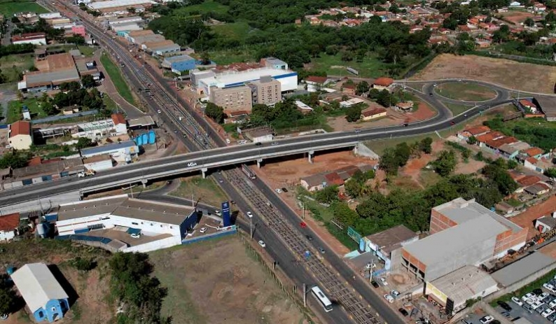 FEB VG